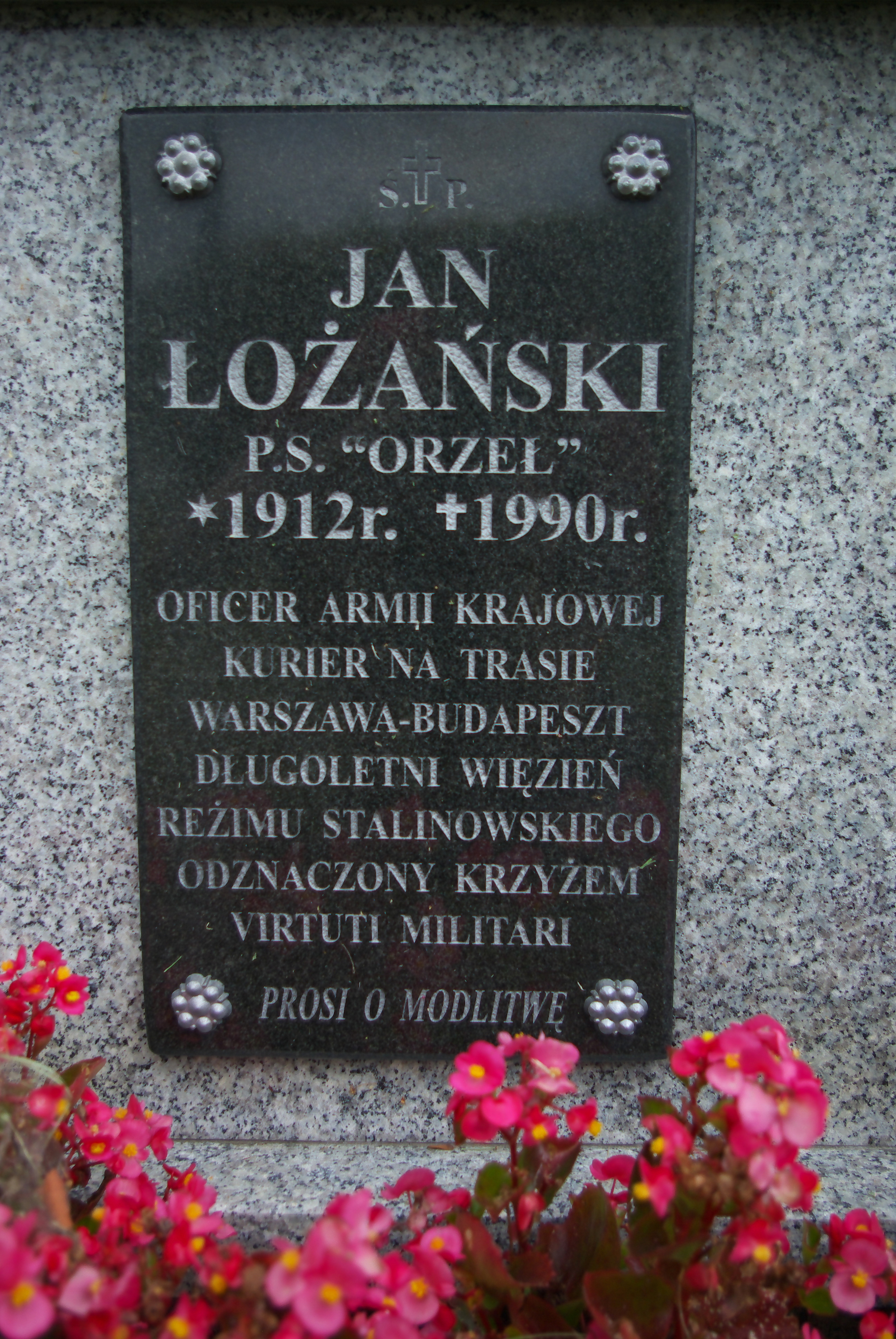 Grobowiec Jana Łożańskiego na Cmentarzu Centralnym w Sanoku (część Matejki).